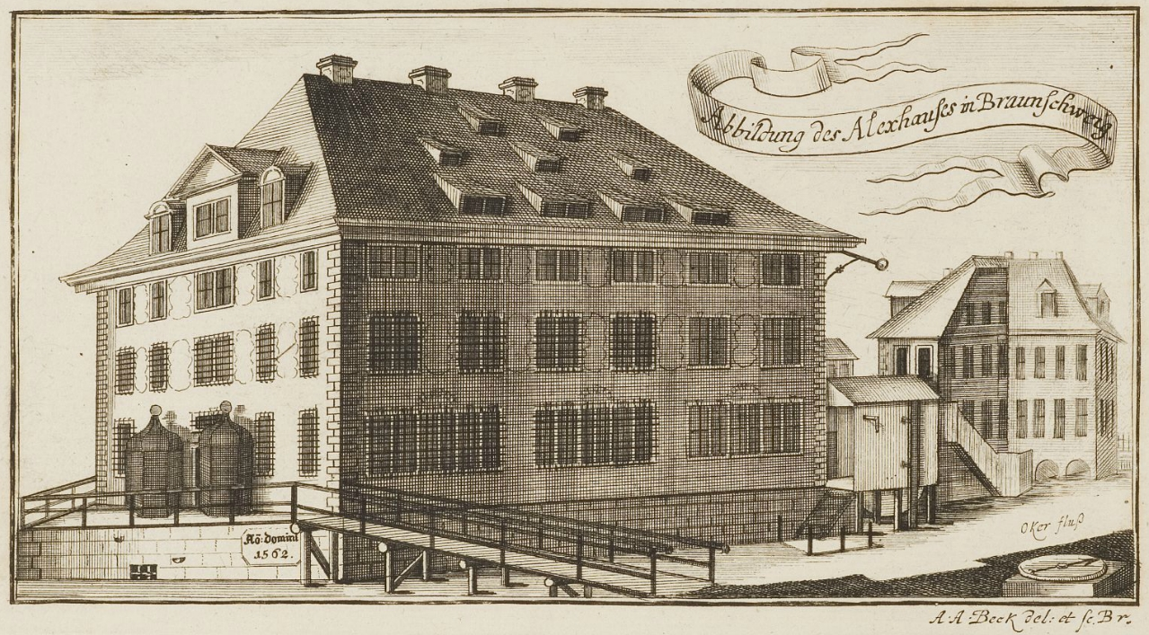 Das Alexiushaus (auch "Alexiusspital" oder "Kornhaus" genannt) in Braunschweig 1756.